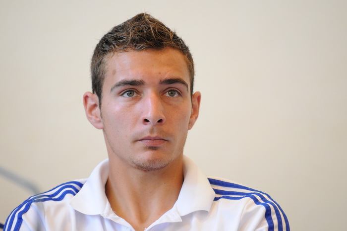 Marco Rubén in 2012